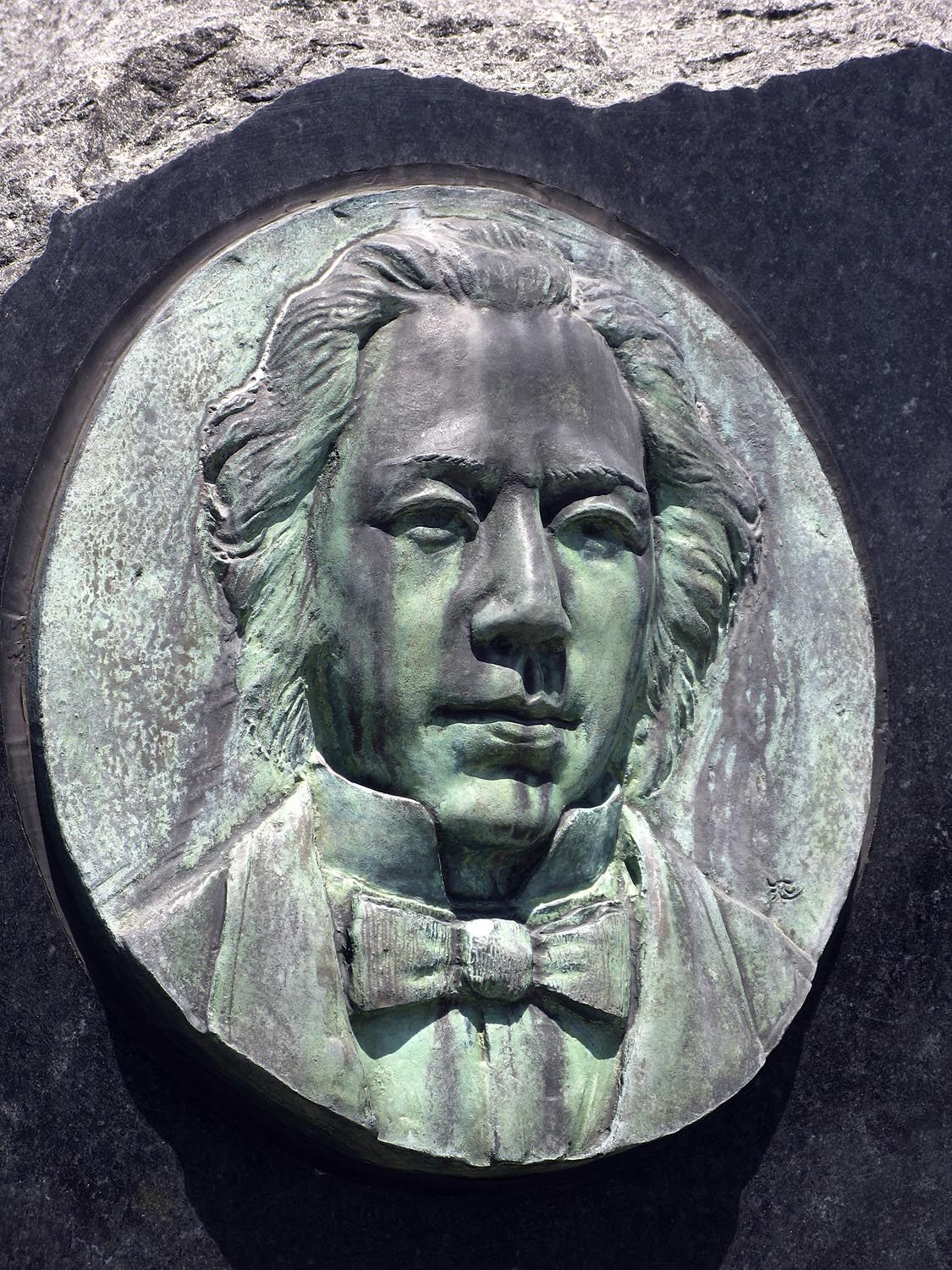 長崎市にあるラナルド・マクドナルド顕彰碑（部分）